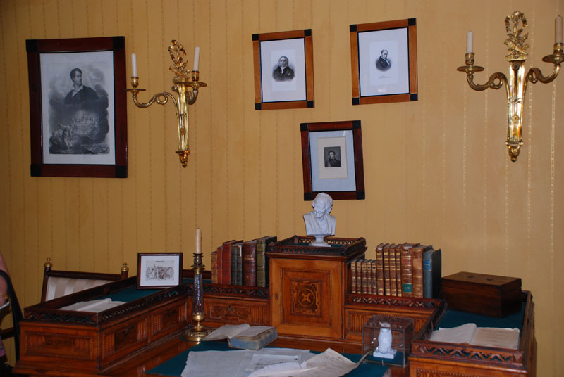 Тарханы. Кабинет в Барском доме.